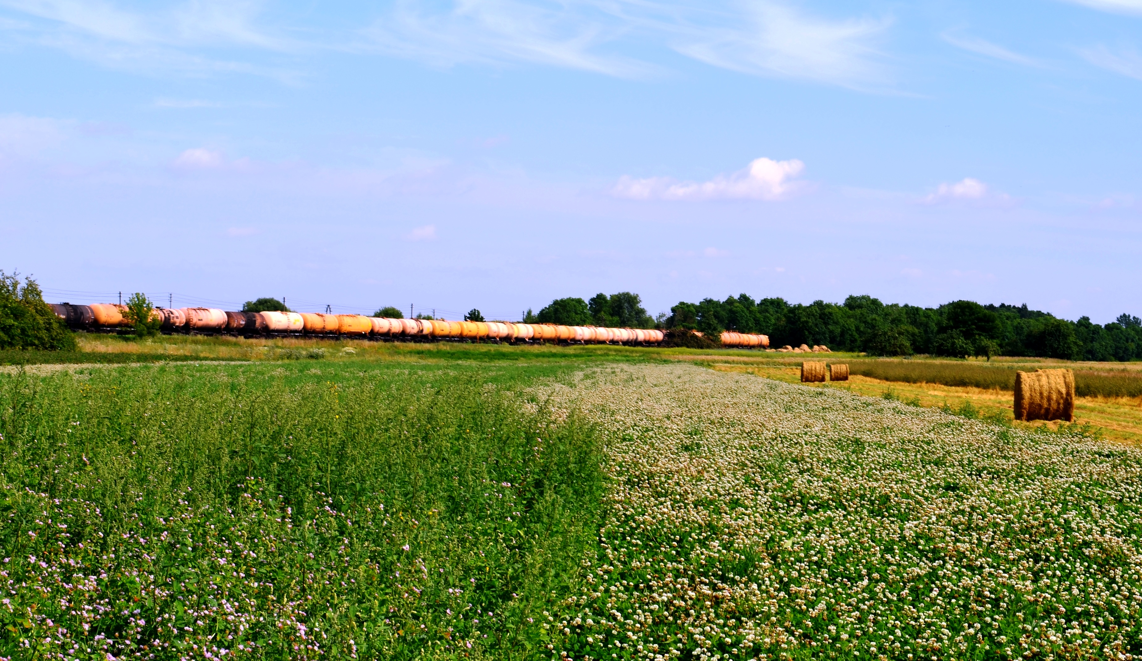 Bandomieji laukai, Akademija, Kėdainių raj.